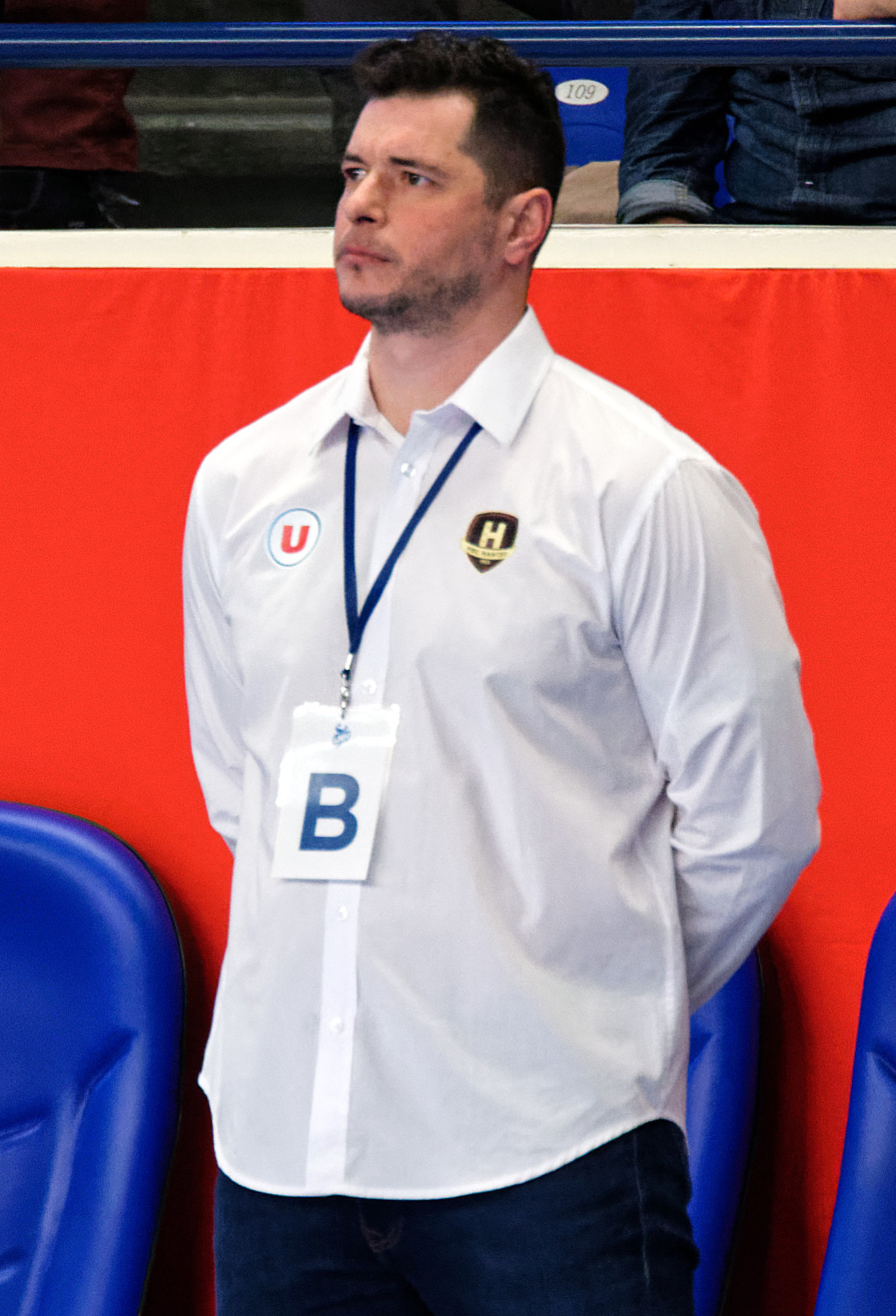 Rencontre de championnat entre le PSG et le HBC Nantes. A Coubertin, le 14 décembre 2018.